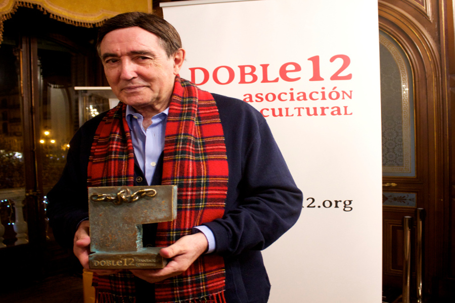 Víctor Manuel Arbeloa con el Cadenas de Navarra